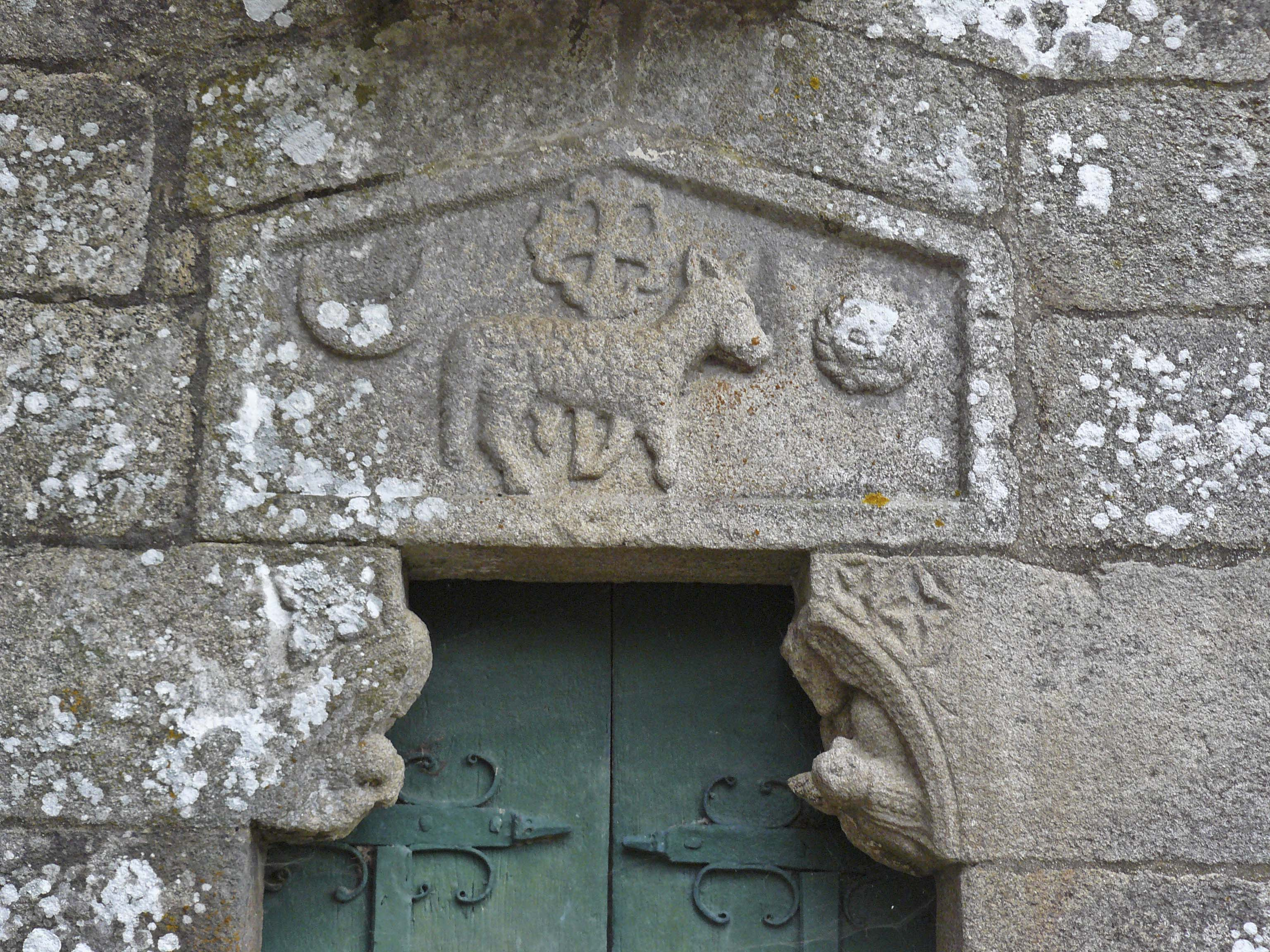 San Pedro de Ansemil. Capela dos Deza. Tímpano.